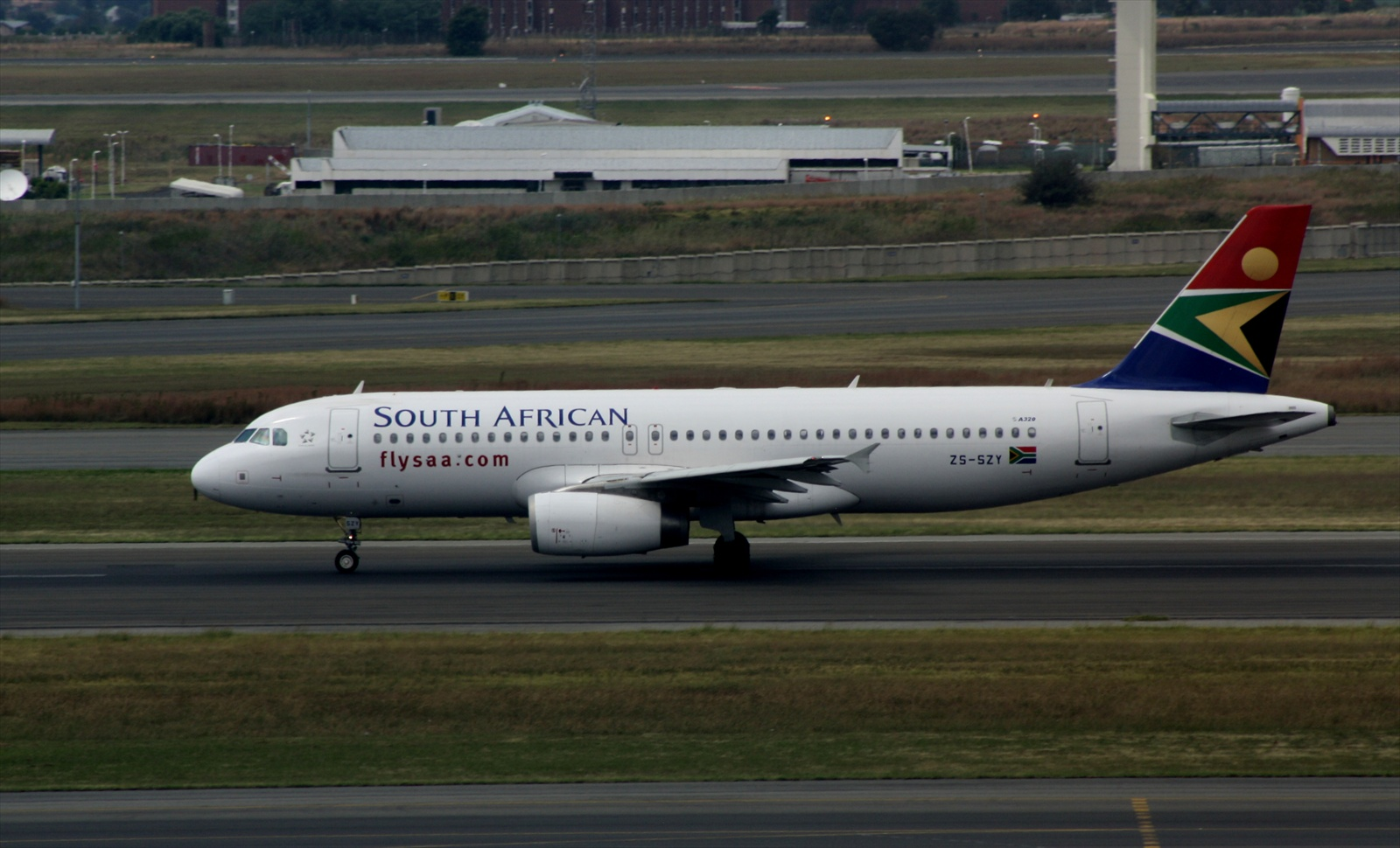 SAA A320-232 ZS-SZY